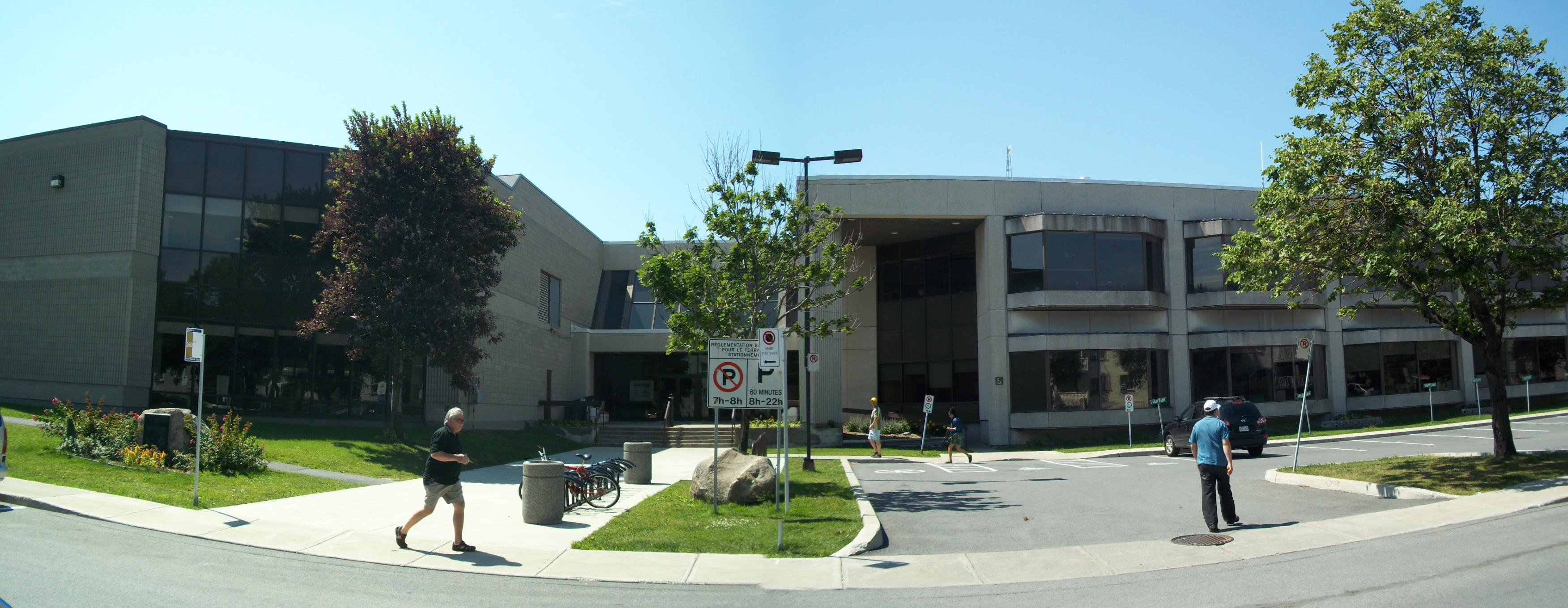 Bibliothèque Jean-Corbeil, Anjou, Montréal